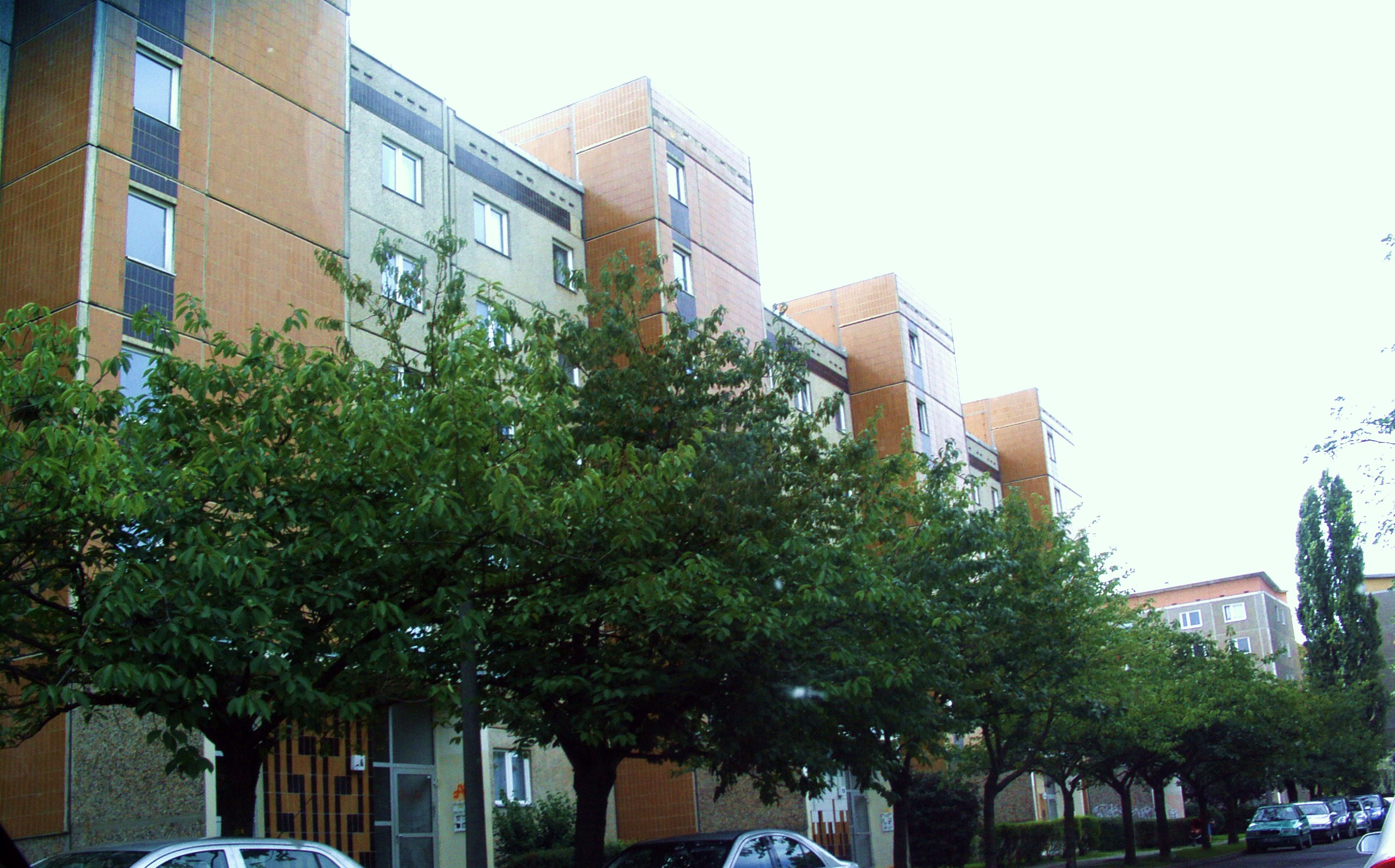 Greta-Garbo-Straße in Berlin-Pankow von der Neumannstraße westwärts